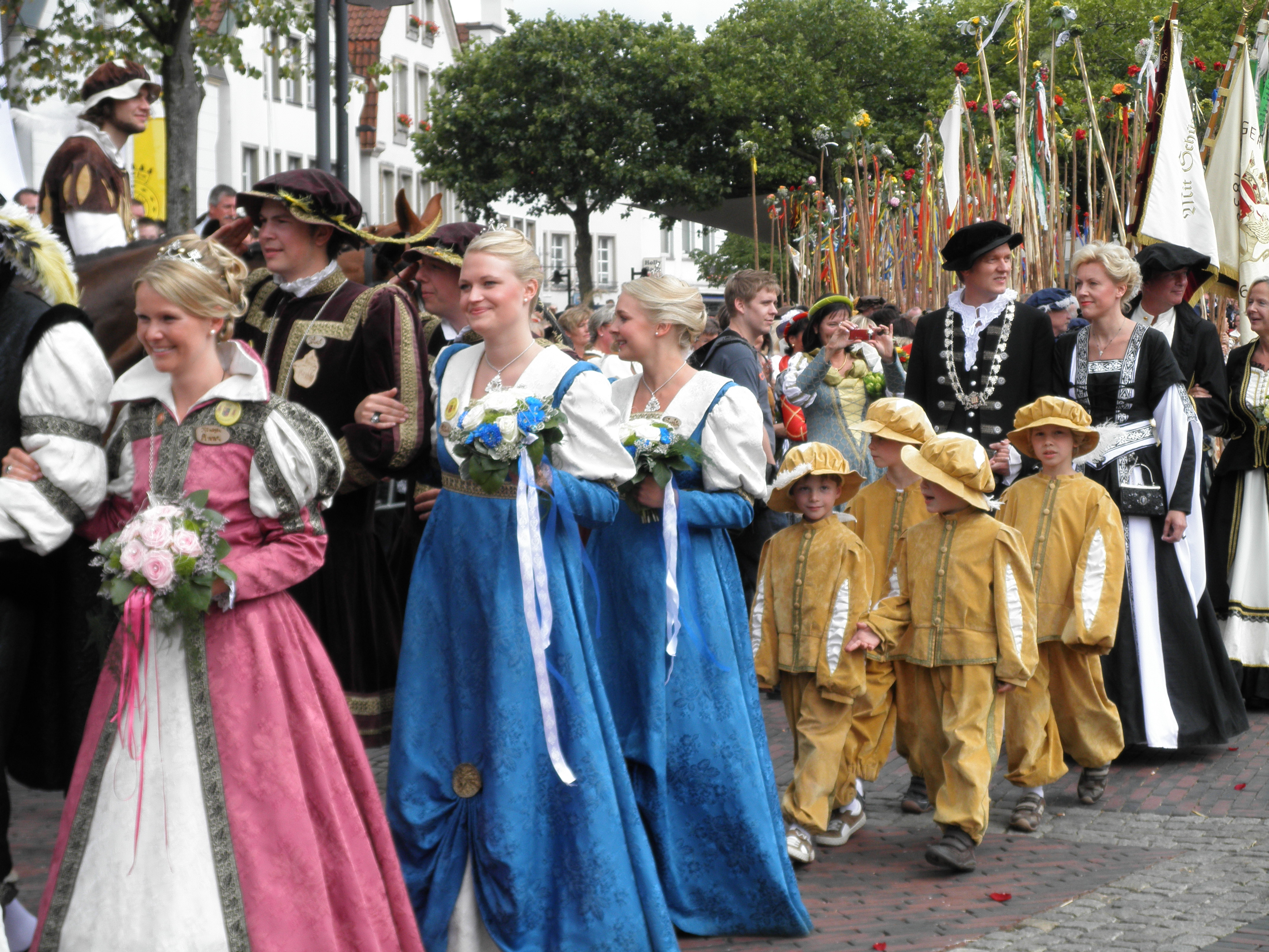 paradante en la mezepoka Kivelingsfest 2011 en Lingen (Ems)